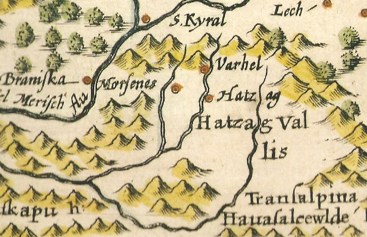 Țara Hațegului așa cum apare într-o hartă de la începutul secolului XVII